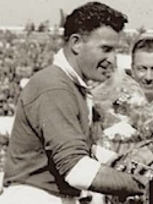 Jean Prat en 1954 (cropped)